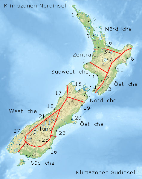 Neuseelandkarte mit Klimazonen und Positionsnummer der Orte